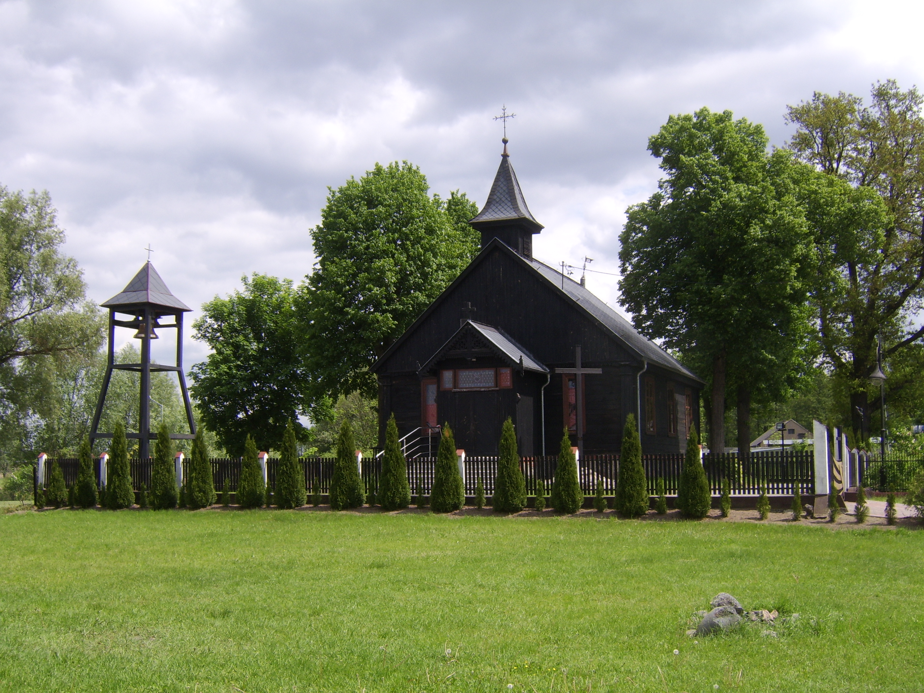 Mała Nieszawka - dawna kaplica mennonicka, obecnie kościół rzymskokatolicki pw. Najświętszego Serca Pana Jezusa (drewn., 1890); cmentarz przykościelny